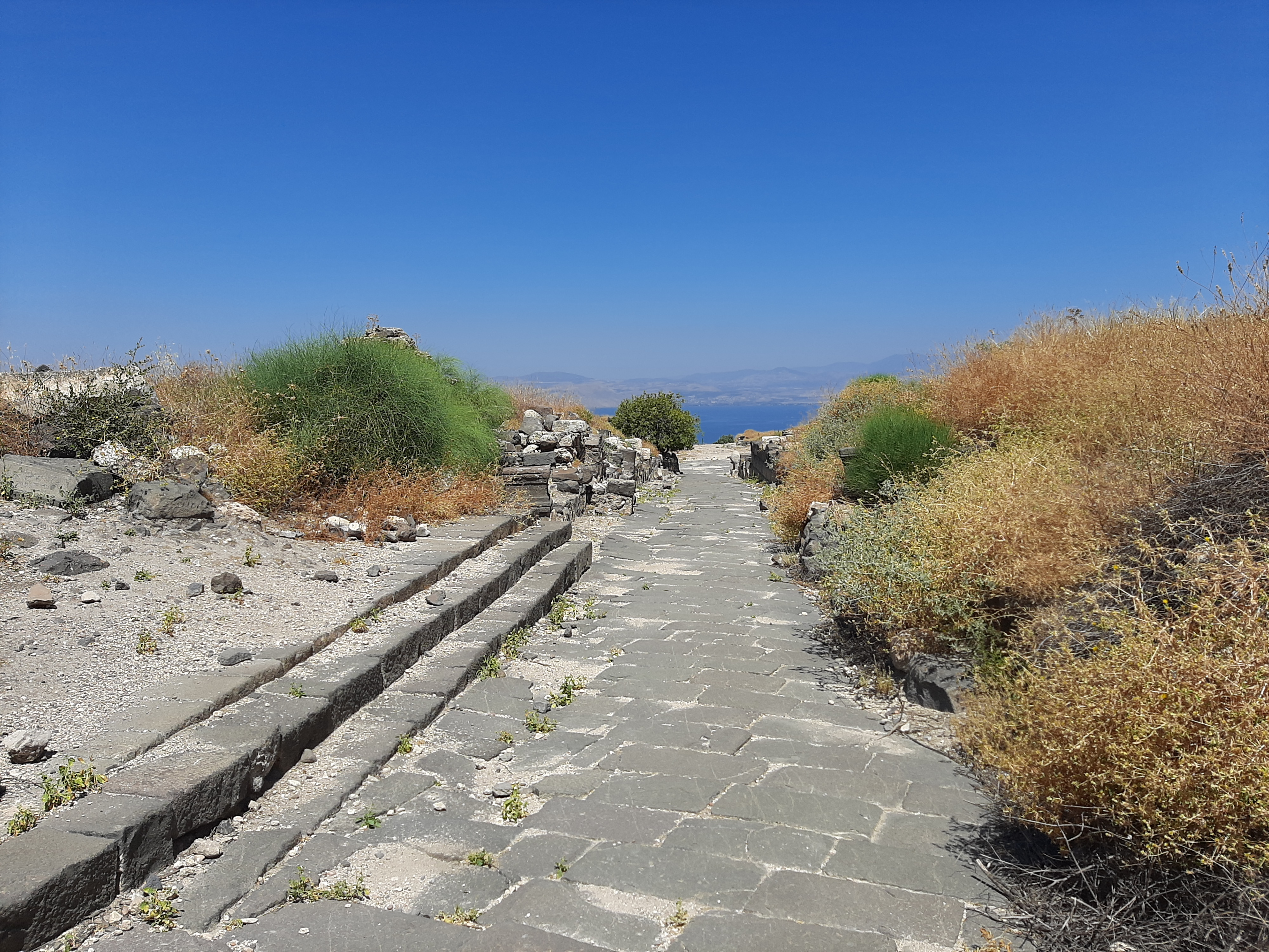 طريق في هيبوس الحصن سوسيتا التقطتها بنفسي palestine11 في الجولان قبل اعمال الترميم